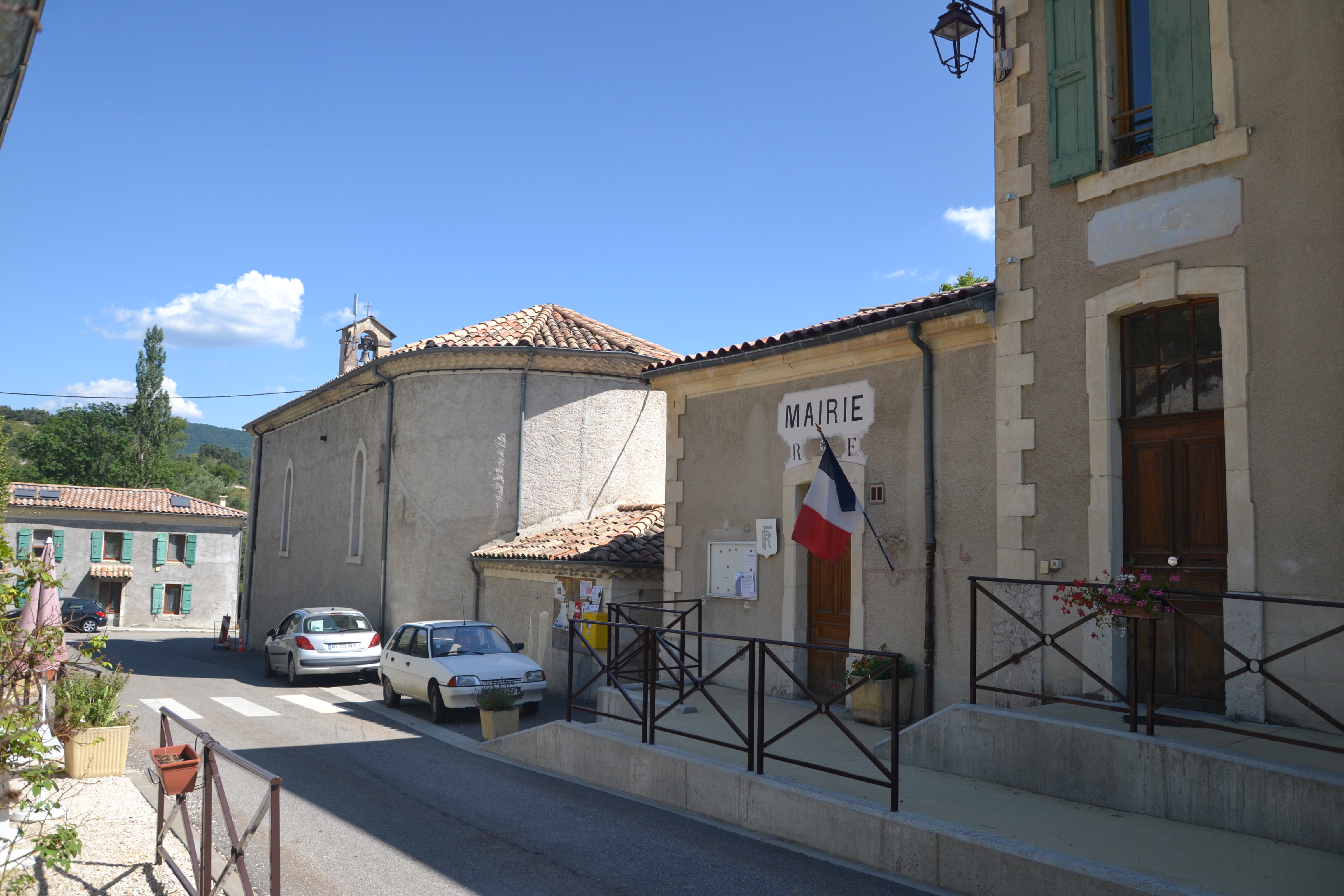 église et mairie de Bellegarde en Diois